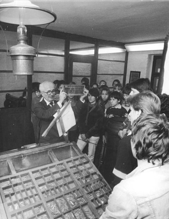 Leipzig, Jugendstunde in der Iskra-Gedenkstätte ADN-ZB Gahlbeck 26.3.85 Leipzig: Jugendstunde. Jugendweiheteilnehmer aus dem Bezirk Halle erlebten wie viele Altersgefährten eine Jugendstunde in der Leipziger Iskra-Gedenkstätte. Der Mitarbeiter des Museums Hans Vorwerk erzählte den Mädchen und Jungen in der ehemaligen kleinen Druckerei, wie die erste Nummer der Leninschen Zeitung Iskra entstand. Im Jahre 1900 wurde die erste gesamtrussische marxistische Zeitung unter der Leitung Lenins hergestellt und verbreitet.